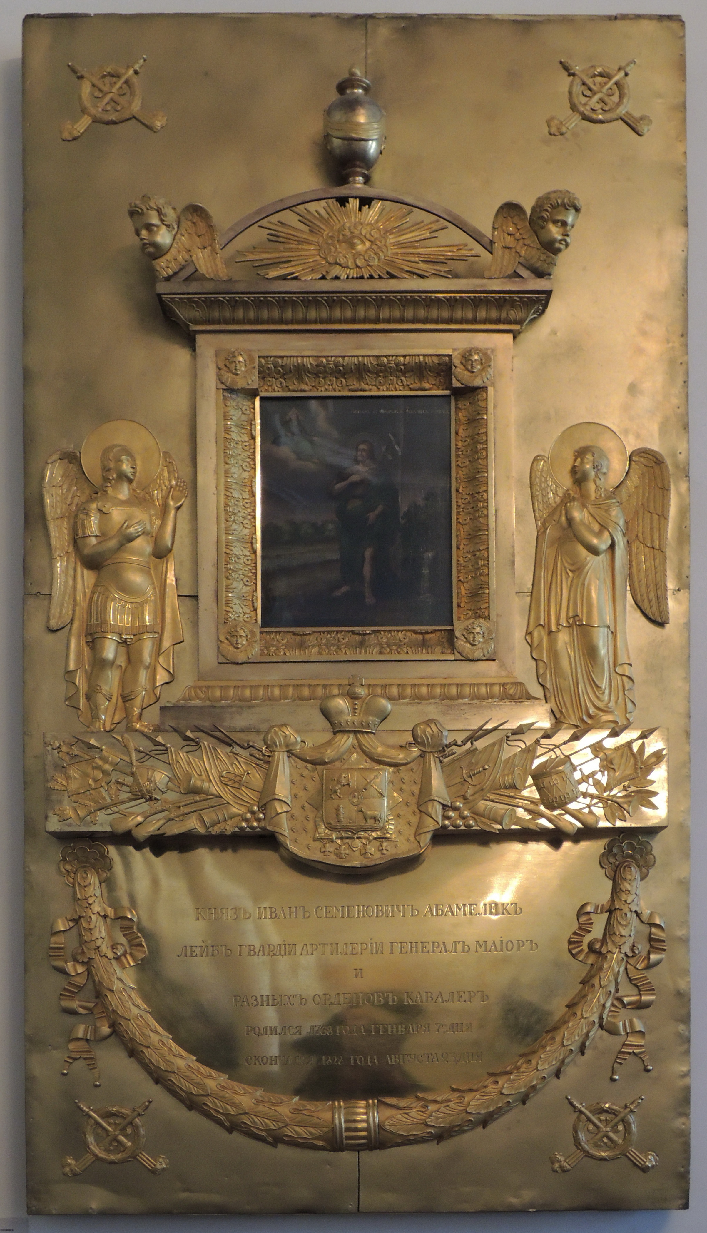 Абамелик Иван Семенович 07.01.1768-23.08.1828 Генерал-майор лейб-гвардии артиллерии. Начальник арсеналов в Киеве и Санкт-Петербурге. Изучал дело артиллерийского производства в Берлине. Помещик Подольской губернии. В 1798 г. приехал из Персии в Петербург. Участвовал в кампаниях: Аустерлиц (20 ноября 1805); Гутштадт (Пруссия, 24 мая), Фридланд (2 июня 1807); Отечественная война 1812 года (Бородино, 26 августа); заграничные походы русской армии (1813-1814); Париж (18 марта 1814). Был награжден орденом Святой Анны I степени. Россия. Санкт-Петербург. Благовещенская усыпальница. Киот. Бронза золоченая, дерево, масло. Мастер А.И. Дипнер, 1820-е гг. Доска: латунь золоченая, дерево; икона: дерево, масло. 215*107*15. Настенная деревянная доска с накладными латунными пластинами и выколотным золоченым декором. В центре киот с иконой Иоанна Крестителя, по сторонам которого рельефы фигур архангелов Гавриила и Михаила. Под киотом щиток с гербом на фоне знамен и военной арматуры. На полуовальном картуше, обвитом гирляндой, выгравирована надпись: "Князь Иван Семенович Абамелик / лейб гвардии артиллерии генерал майор / и / разных орденов кавалер. / Родился 1768 года генваря 7-го дня / скончался 1828 года августа 23-го дня". Памятник по композиционному решению близок подписной работе петербургского бронзовщика А.И. Дипнера - надгробию Е.И. Голенищевой-Кутузовой, выполненному в 1820-е гг. Памятник был перенесен из Воскресенской церкви на Смоленском армянском кладбище в 1936 г. День рождения 7 января (по старому стилю). День памяти 23 августа (по старому стилю).